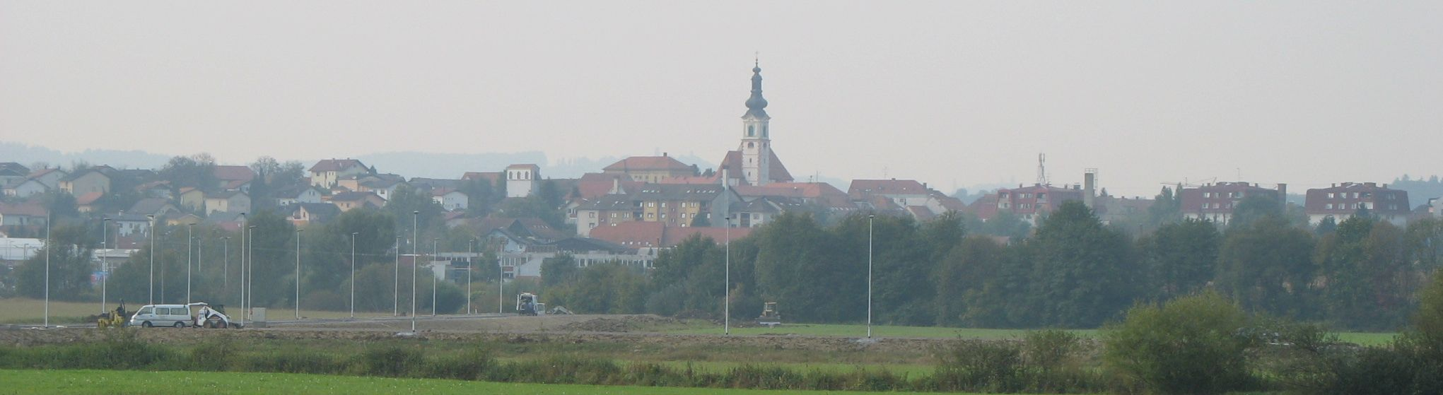 Pogled s severovzhoda na mesto Lenart